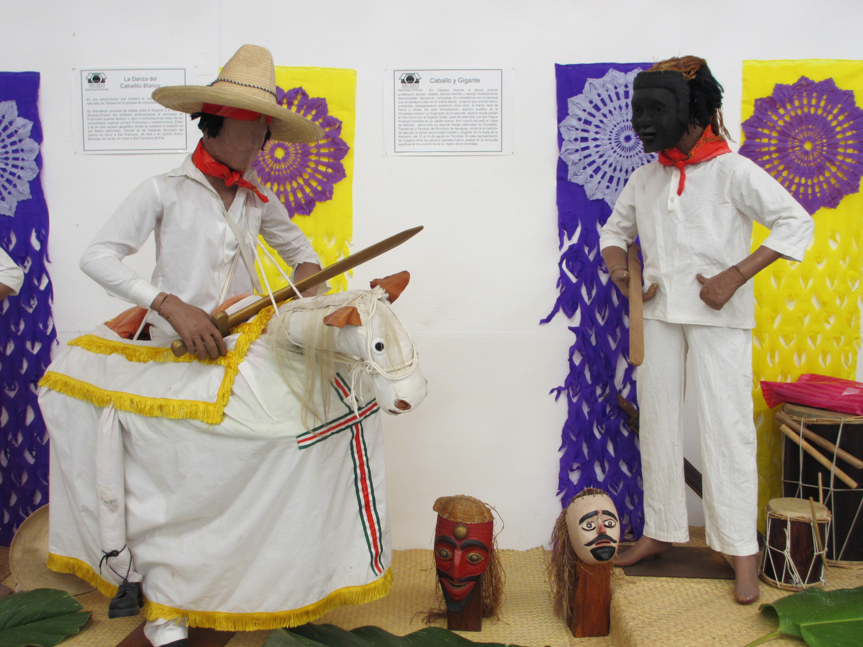 Indumentaria utilizada por los participantes en la danza del "Caballo y el Gigante", que se baila en el municipio de Jalpa de Méndez y en las comunidades de Olcuatitán, Tapotzingo y Tecoluta de el municipio de Nacajuca. Una de las danzas más importantes y autóctonas del estado de Tabasco, México.